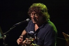 Músico brasileiro Toninho Horta em imagem do acervo da TV Brasil.